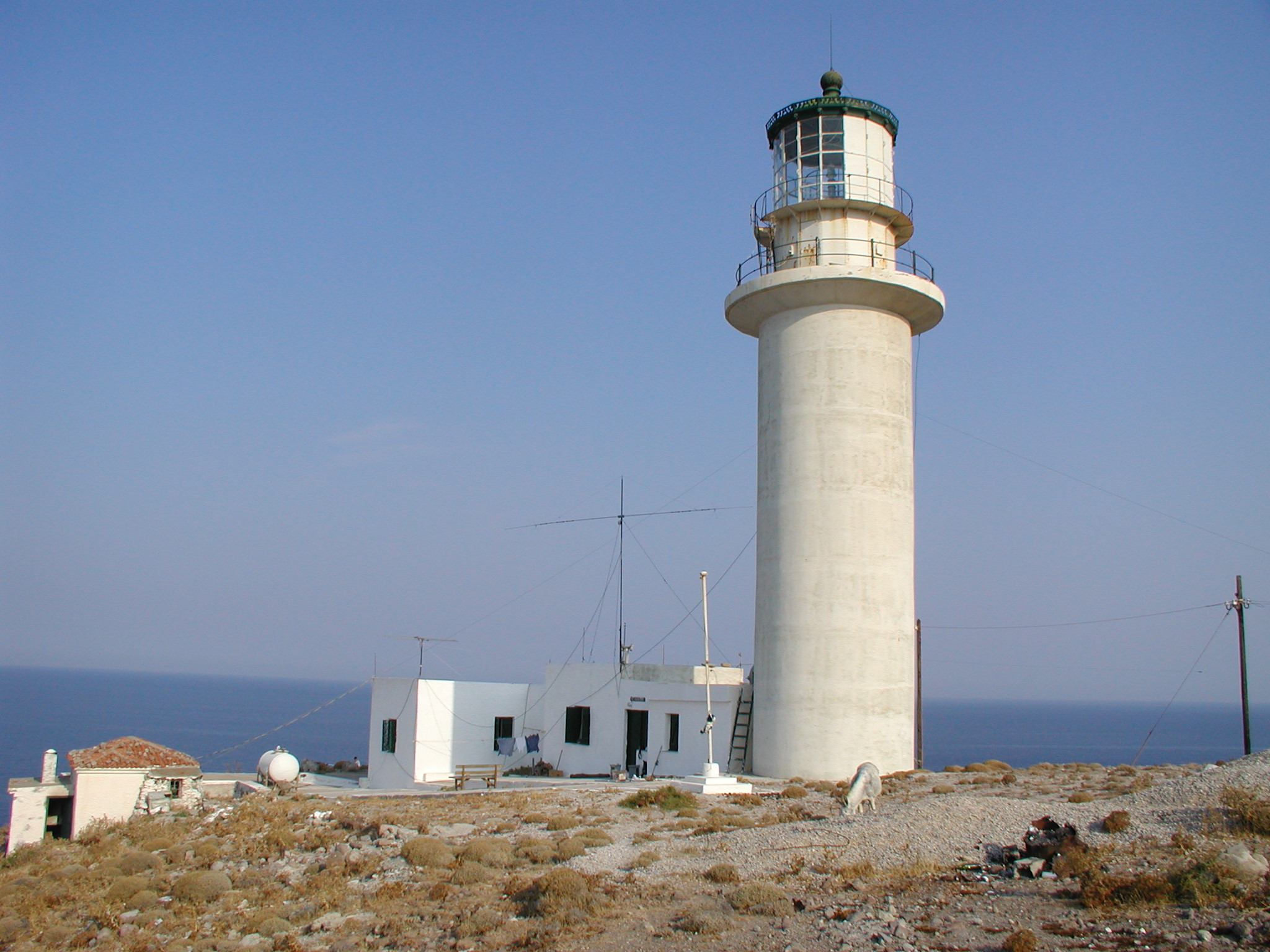 Lighthouse of Sigri, Lesvos, Greece